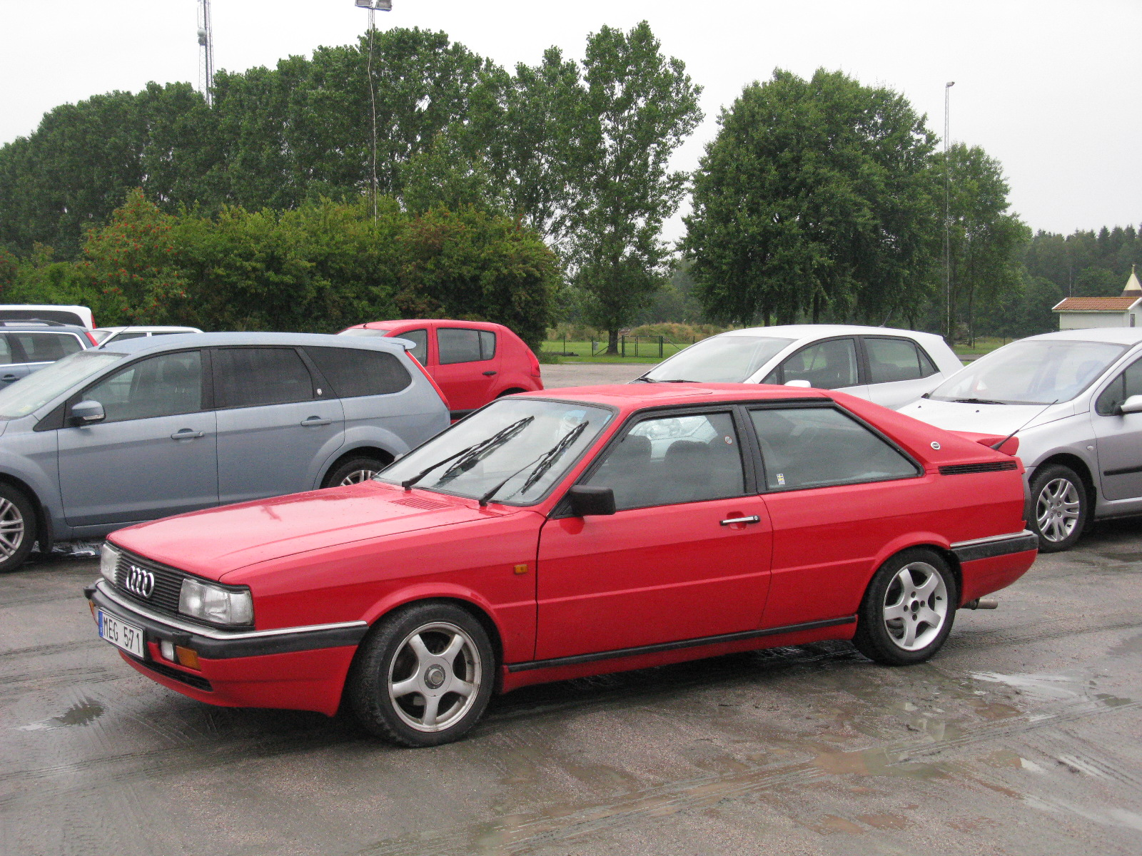 Audi Coupé